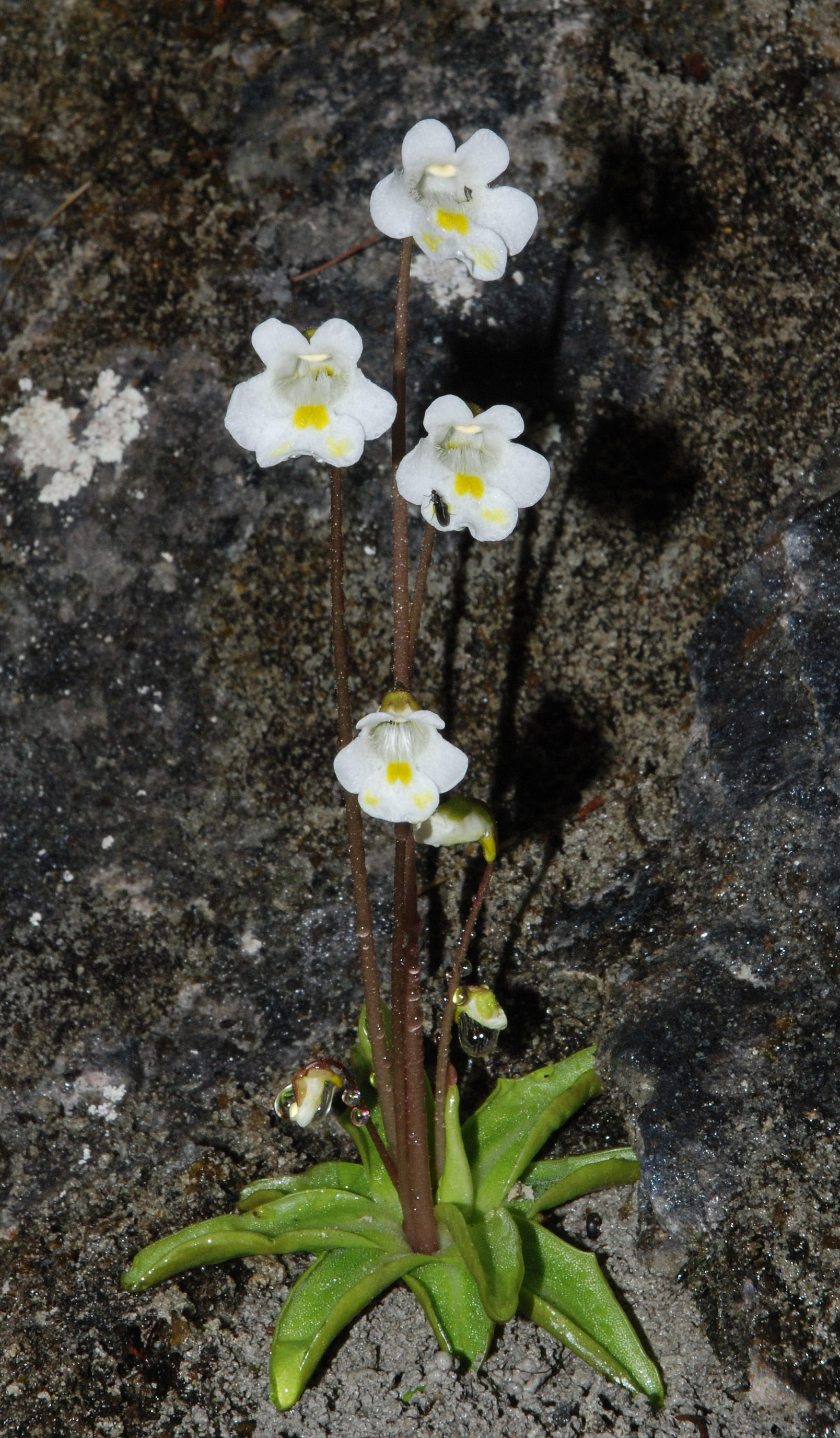 'Pinguicula alpina , Trifsteig / Reichraminger Hintergebirge, Austria